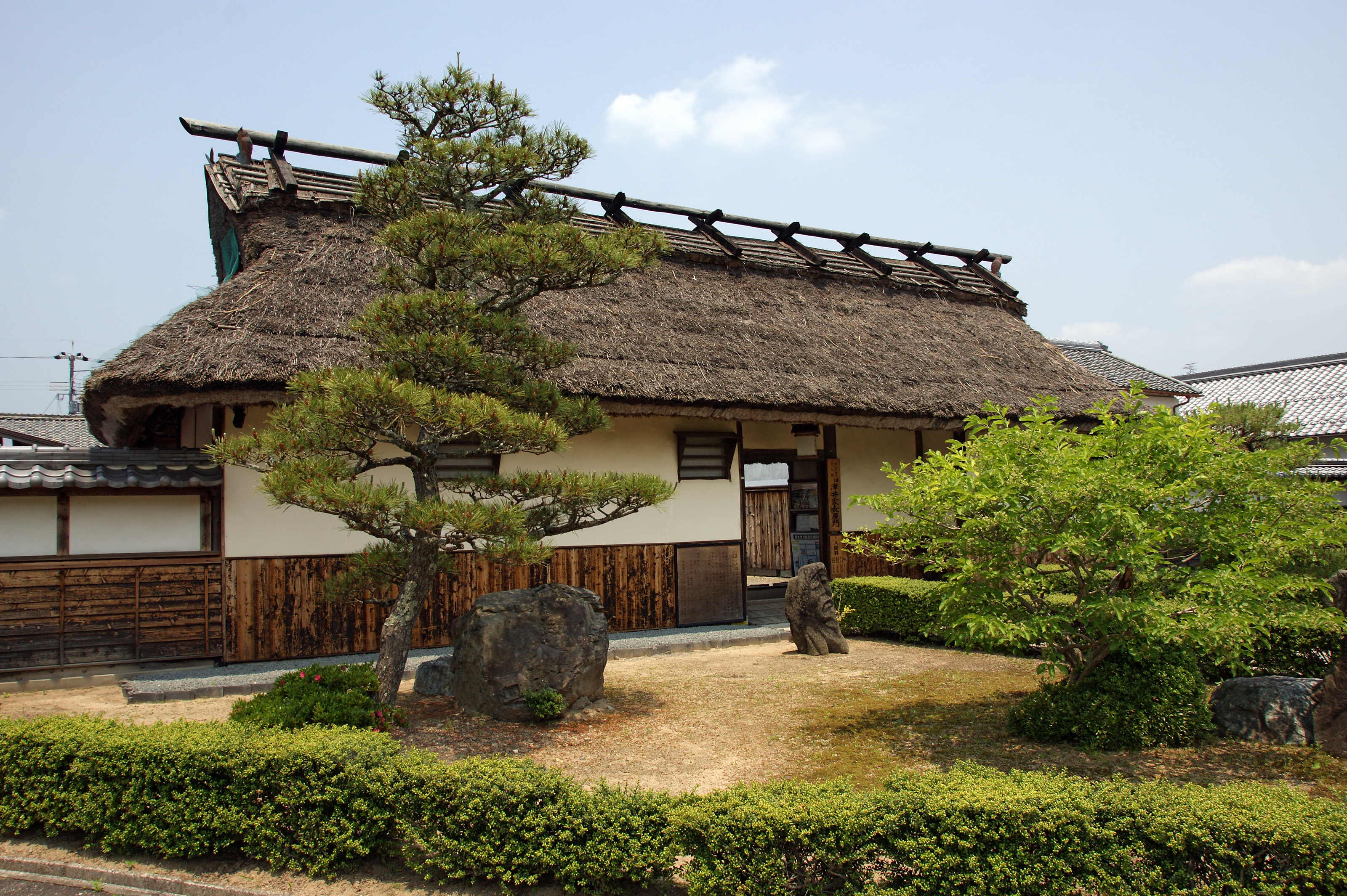 Aoyama Rekishi-Mura in Sasayama, Hyogo prefecture, Japan